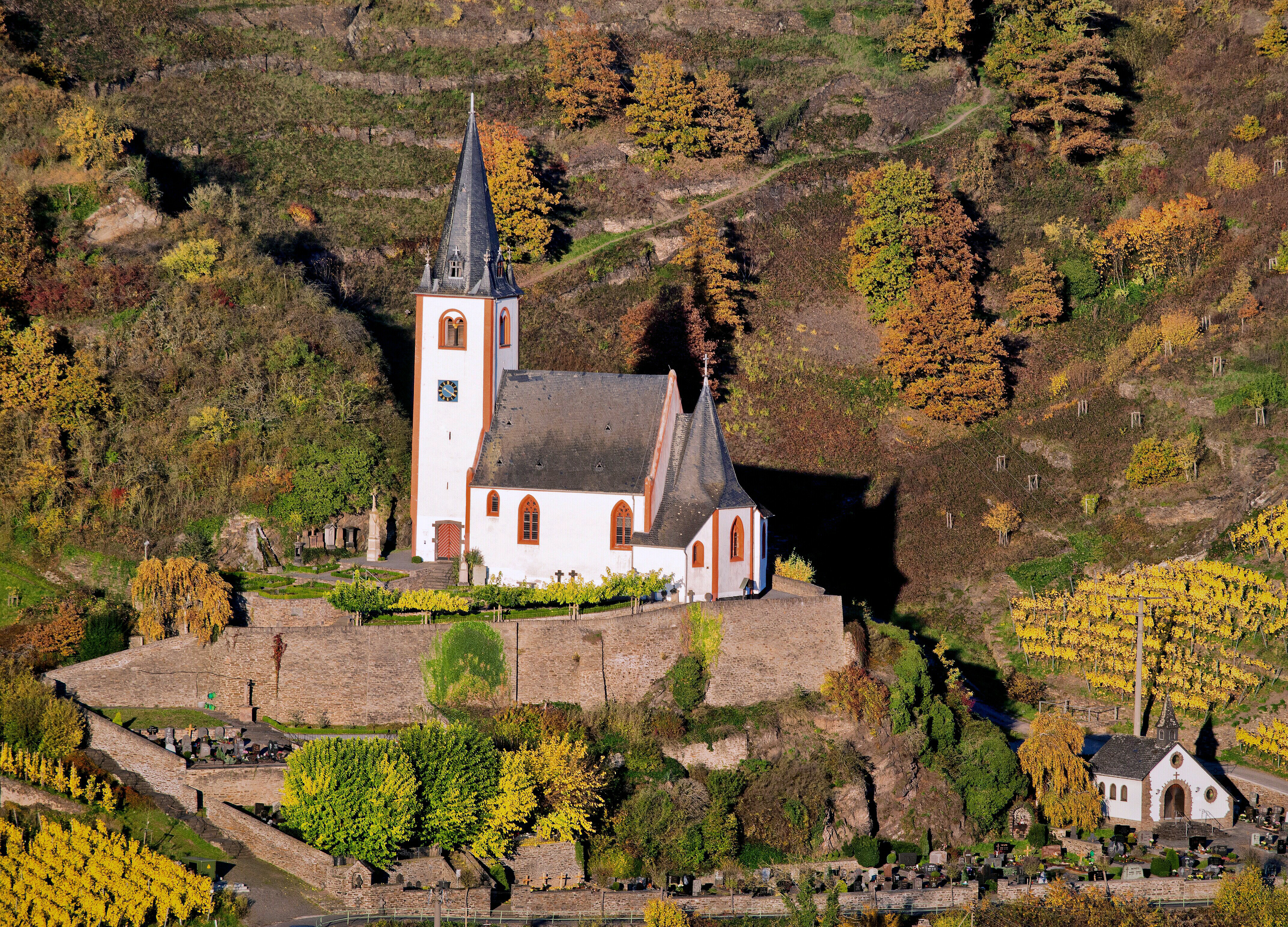 Auf steil abfallender Felshöhe überragt die dem Evangelisten Johannes geweihte ehemalige Pfarrkirche mit ihrem romanischen Glockenturm und dem gotischen Langhaus den Weinort Hatzenport an der Mosel.